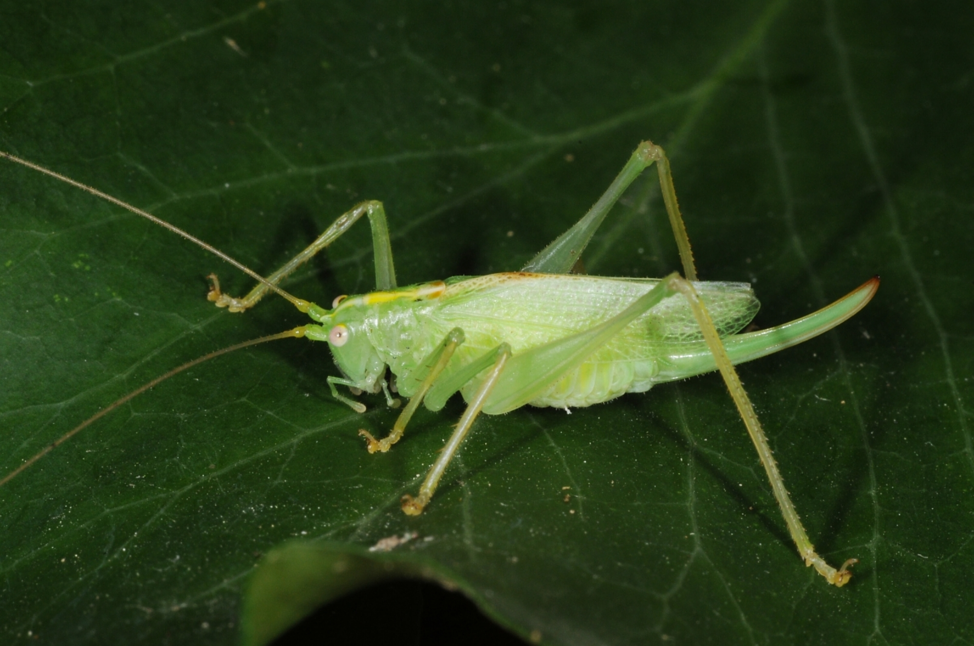 Meconema_thalassinum, Schwanheimer Düne, Frankfurt am Main, Hessen, Deutschland